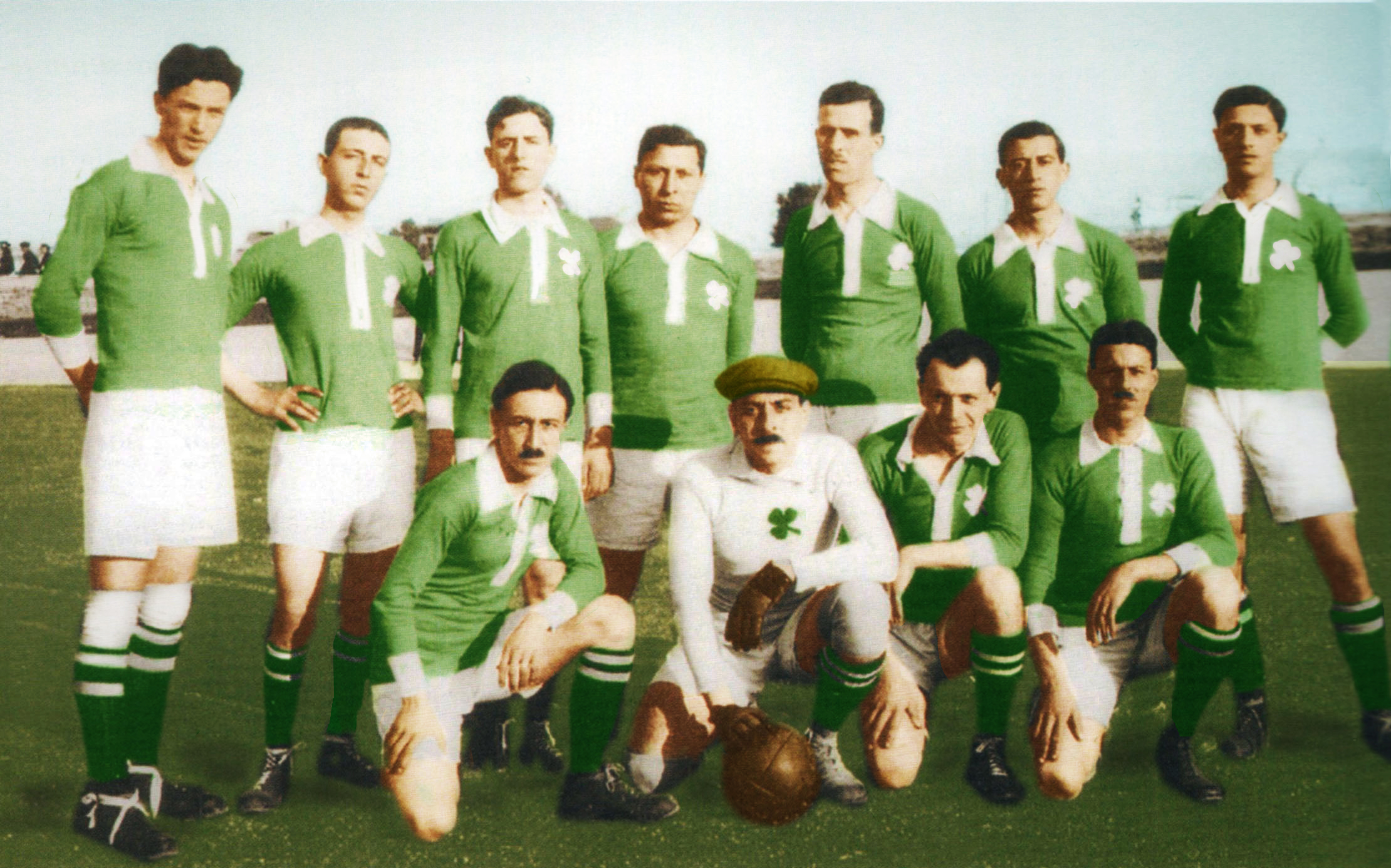 Η ποδοσφαιρική ομάδα του Παναθηναϊκού το 1921. Χρύσανθος Βλάχος, Κώστας Ζάκκας, Σωτήρης Ασπρογέρακας, Γιώργος Καλαφάτης, Γιάννης Σταυρόπουλος, Λουκάς Πανουργιάς, Μαρίνος Βεντουρέλης, Μιχάλης Κρίσπης, Δημήτρης Δεμερτζής, Απόστολος Νικολαΐδης, Λουκιανός Καντώνης Η φωτογραφία έχει υποστεί επεργασία με χρώμα από το χρήστη Sportingn